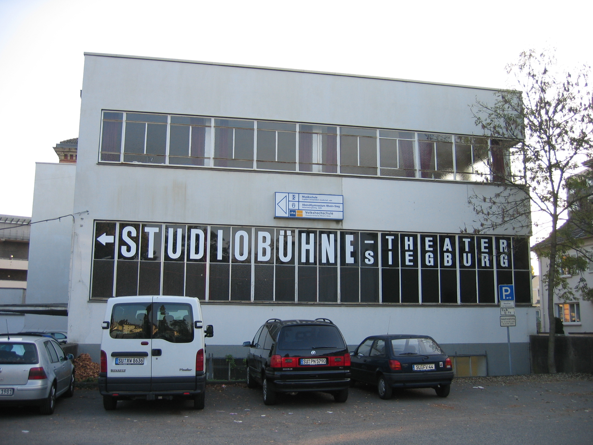 Studiobühne Siegburg